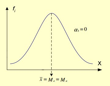 Графички приказ за Симетричен распоред